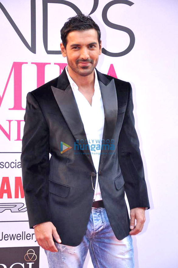 John Abraham at Femina Miss India finale 2013 at Yashraj Studio